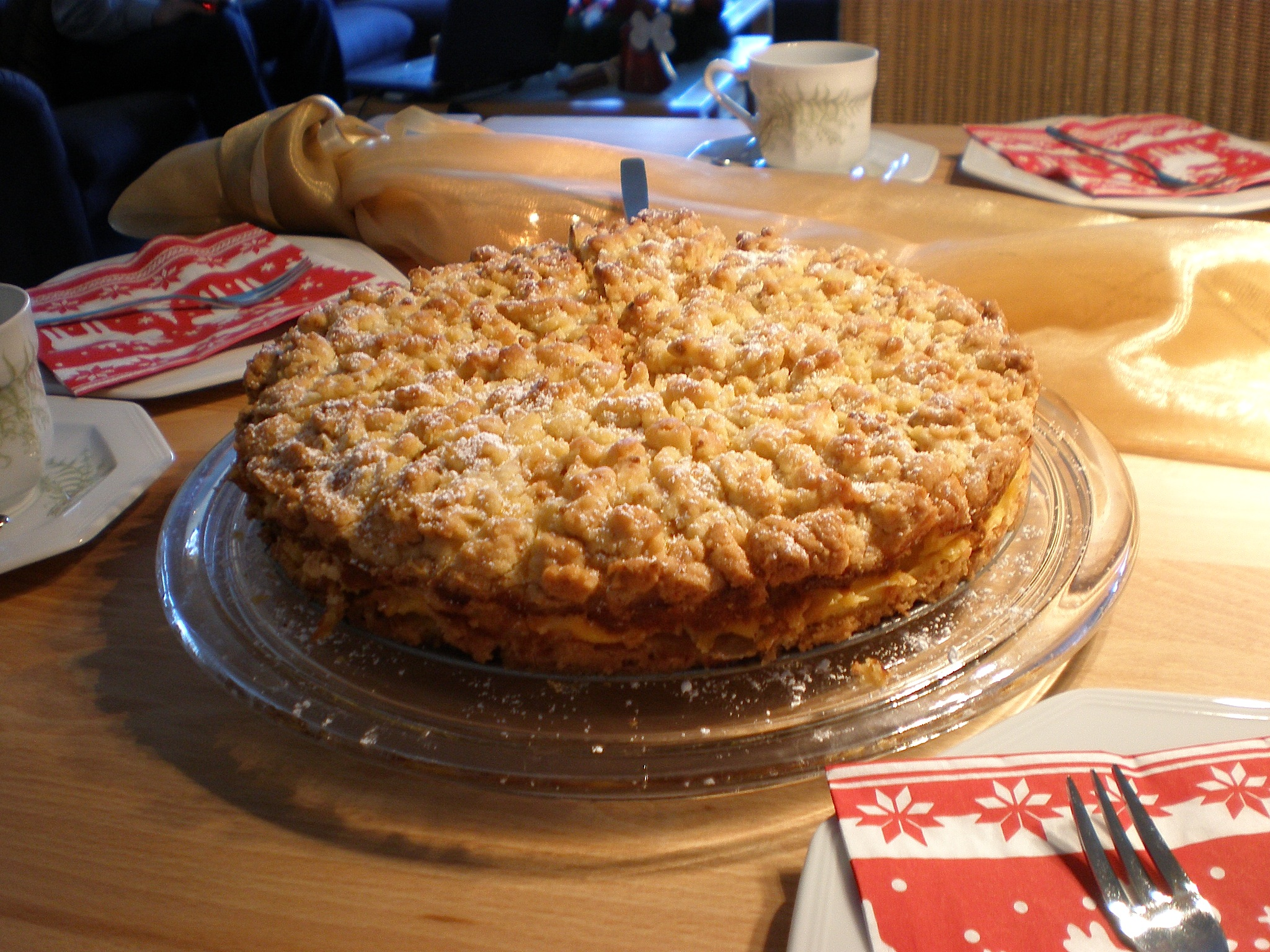 mit Vanillerahmguss und Krokant